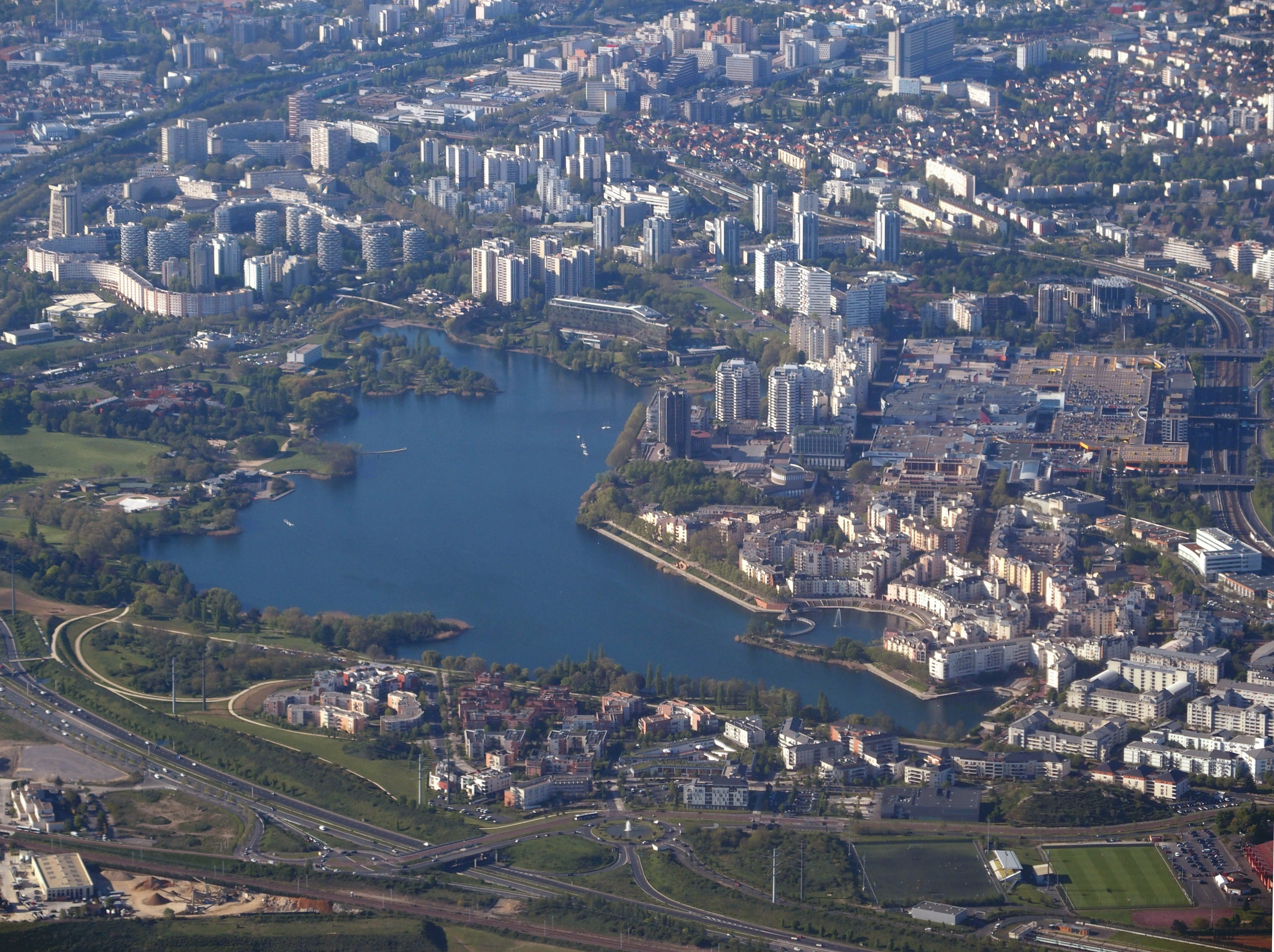 Vue aérienne du lac de Créteil